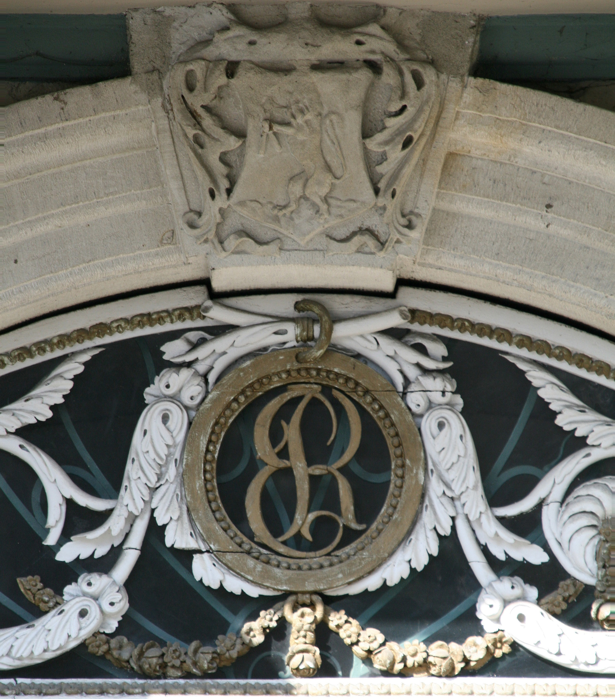 Landeshauptmann Adolf-Rhomberg-Haus erbaut 1798, Marktstrasse 26 in Dornbirn (1900) Umbau von Architekt Hanns Kornberger